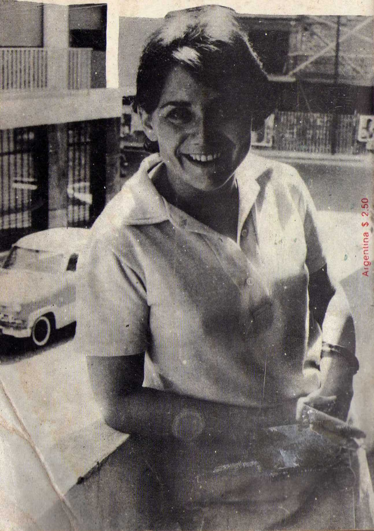 Alicia Steimberg, escritora argentina